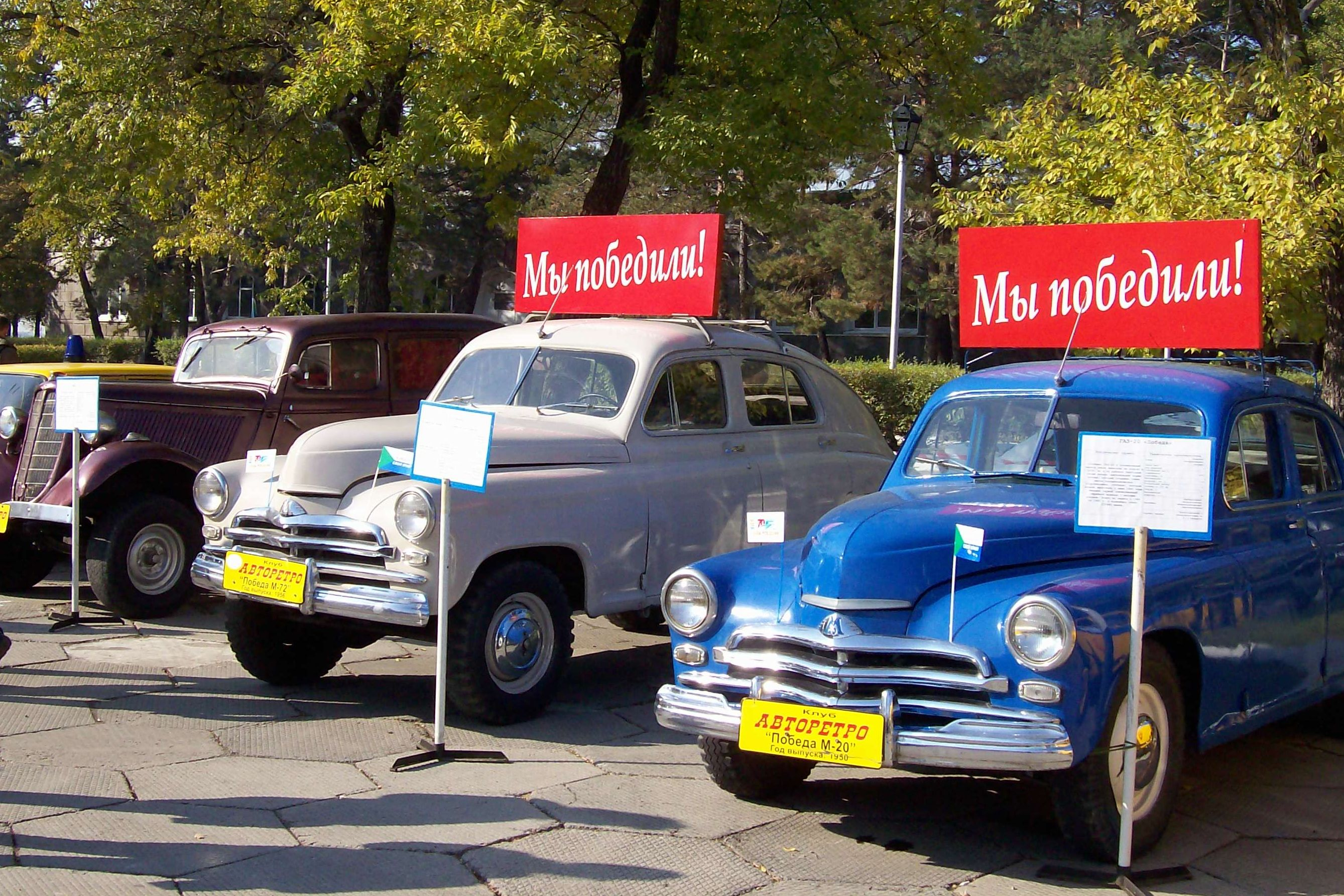 М72 и Победа